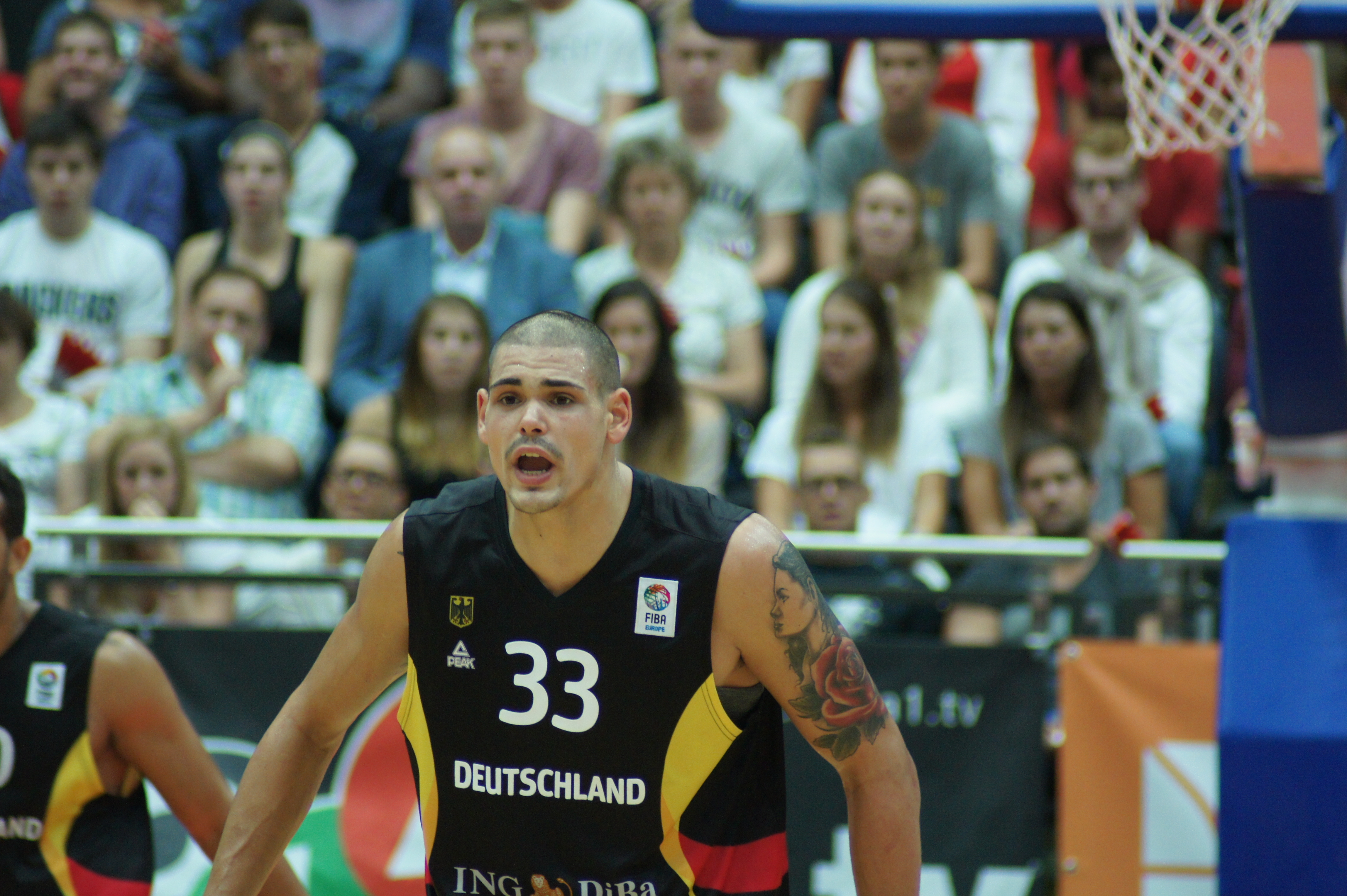 Qualifikationsspiel EuroBasket Österreich - Deutschland, 13. August 2014 im Multiversum Schwechat.